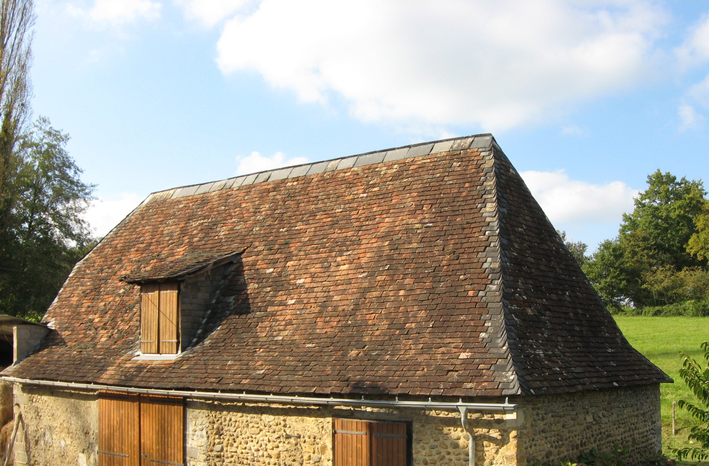 Vue d'une toiture typiquement béarnaise en tuiles "picon" et ardoises (Monein) (Pyrénées Atlantiques) Pyrénées).